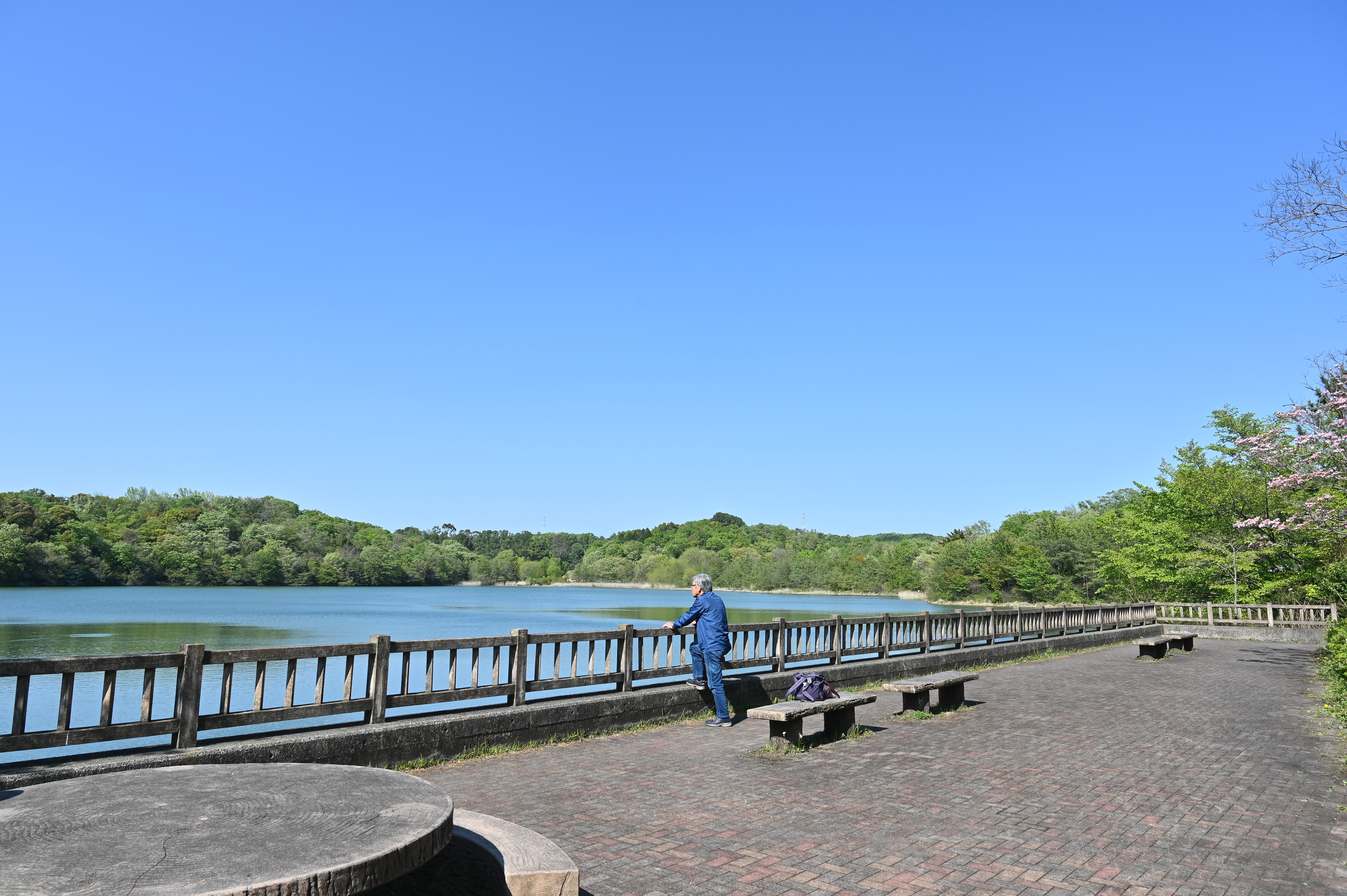 小幡緑地本園にある緑ヶ池